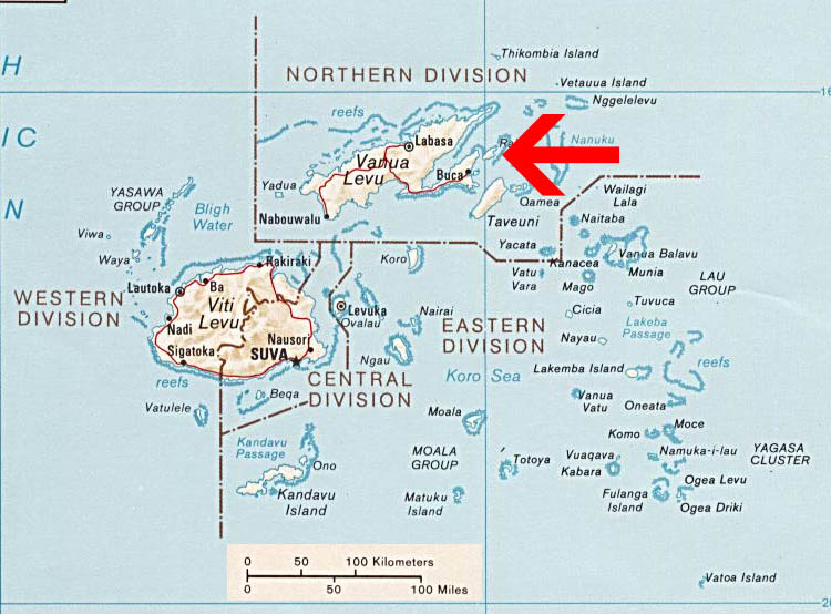 Rabi Island